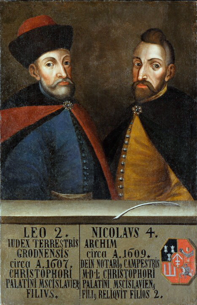 Беларуская (тарашкевіца): Партрэт братоў Льва (Leŭ Sapieha) і Мікалая (Mikałaj Sapieha) Сапегаў (Sapiehi)